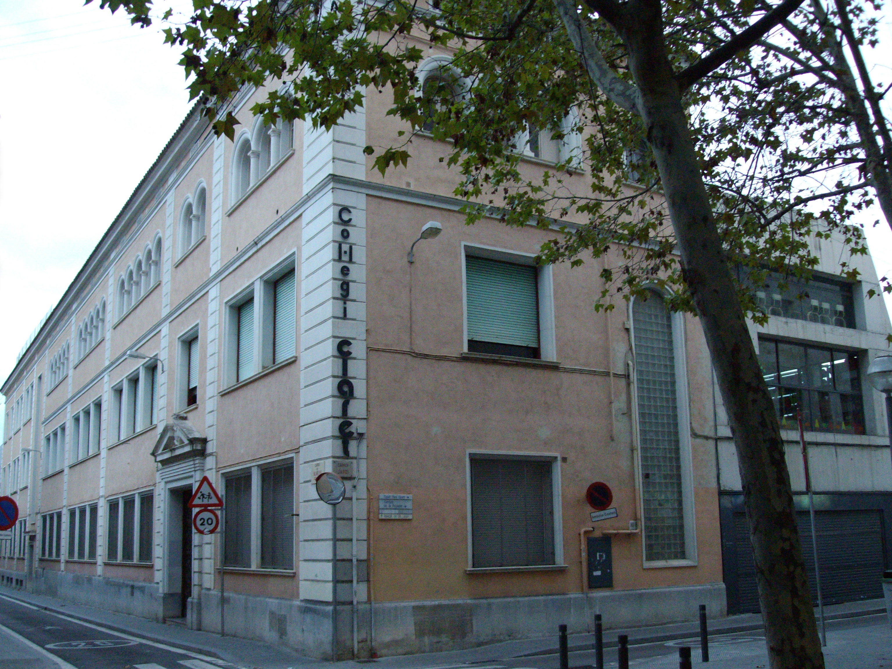 Colegio Claret de Sabadell, situado en la calle de Sallarés i Plà, 10, de Sabadell, Barcelona (España)..